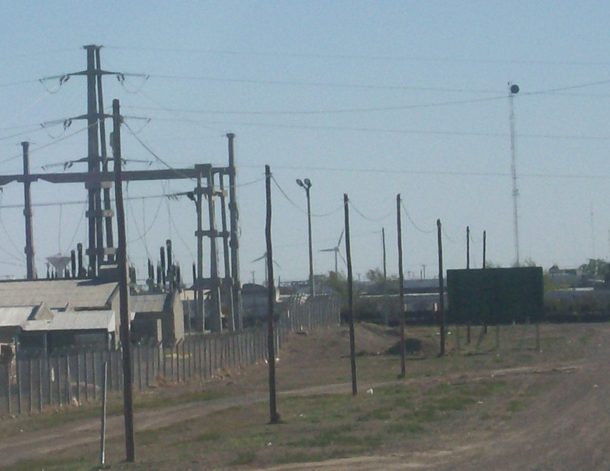 Parque eolico visto desde PCR